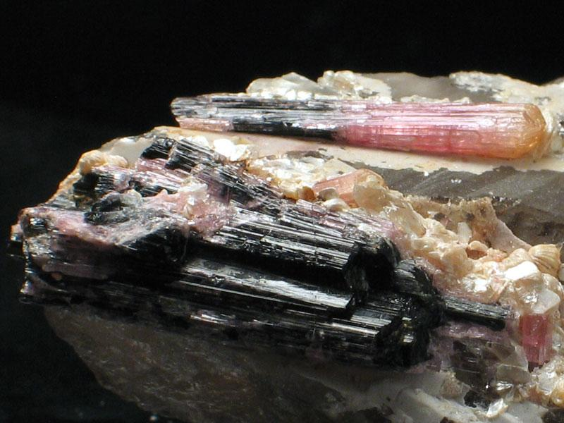 cookeit, turmalin, kwarc, pochodzenie Madagaskar; autor zdjecia Stowarzyszenie Spirifer